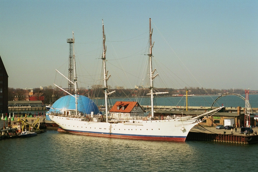 selbst fotografiert, GNU-FDL